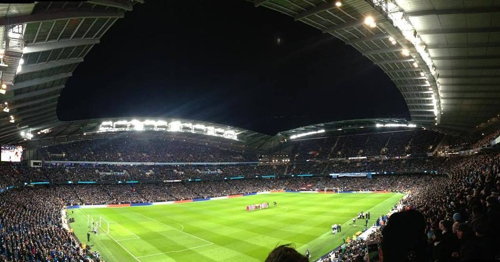 Etihad Stadium de noite.